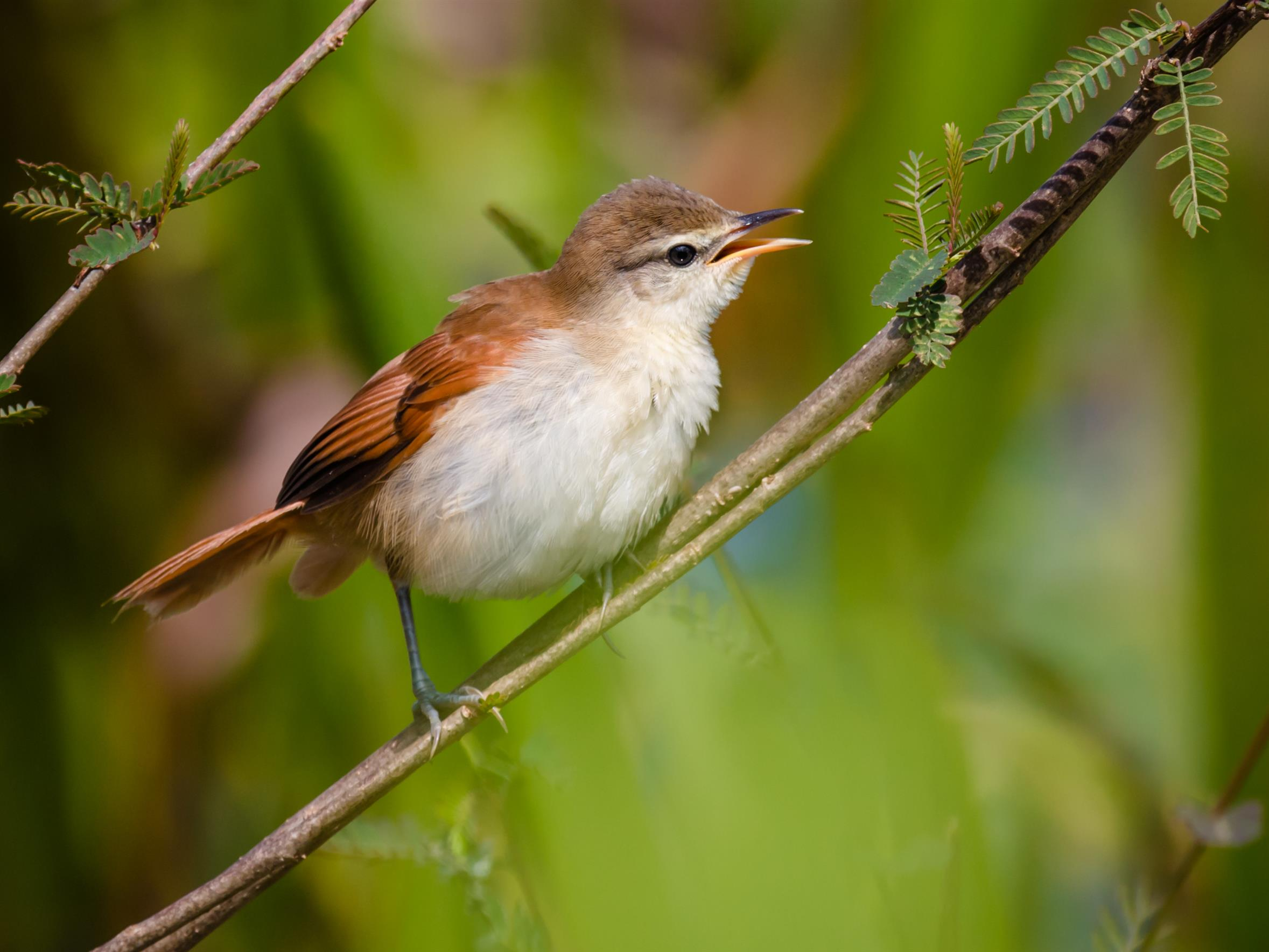 Ave avistada na Transpantaneira.